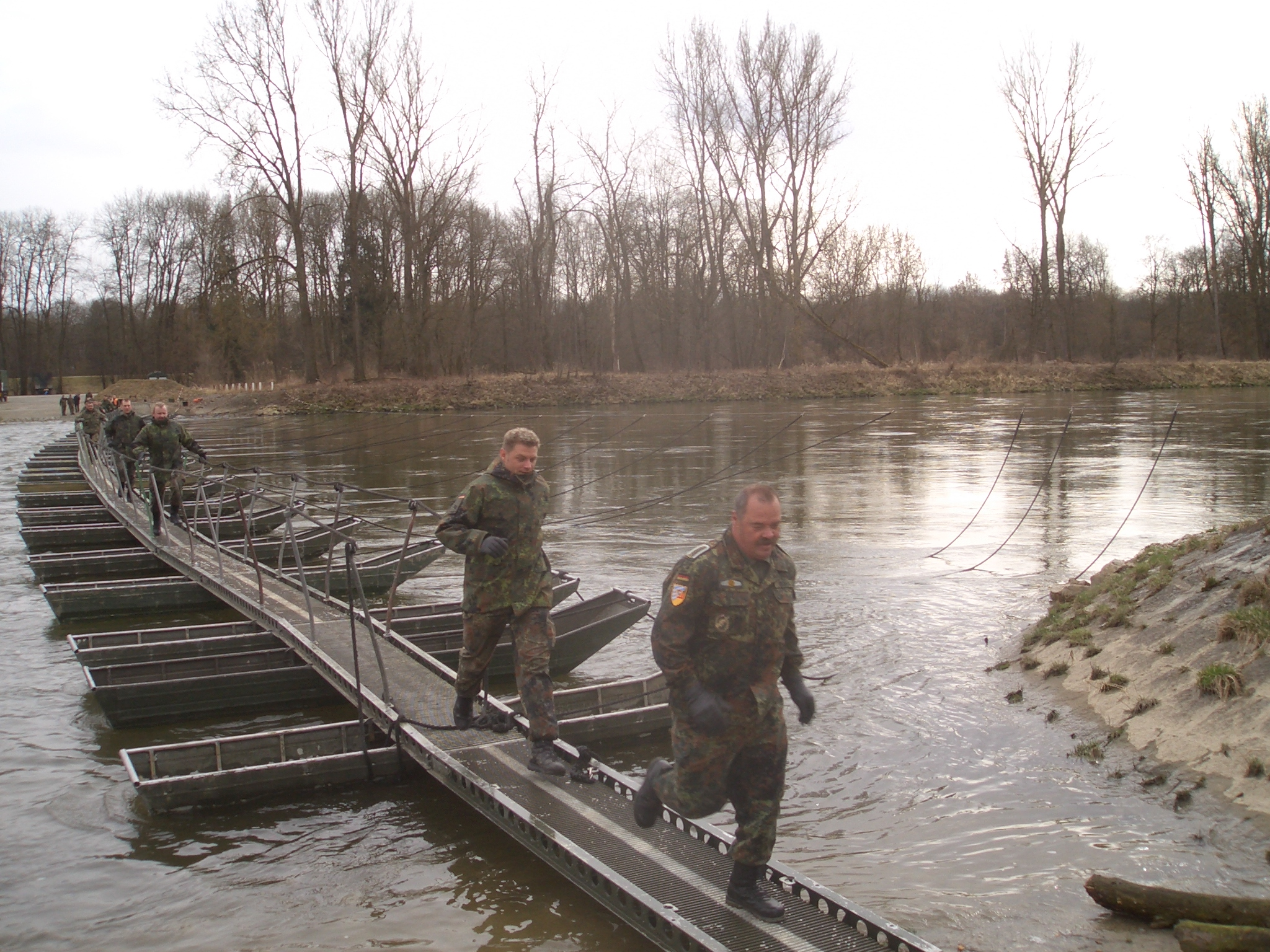 Soldaten überwinden die Donau bei Wackerstein (Bayern) mit Hilfe eines Schützenschwimmsteges.